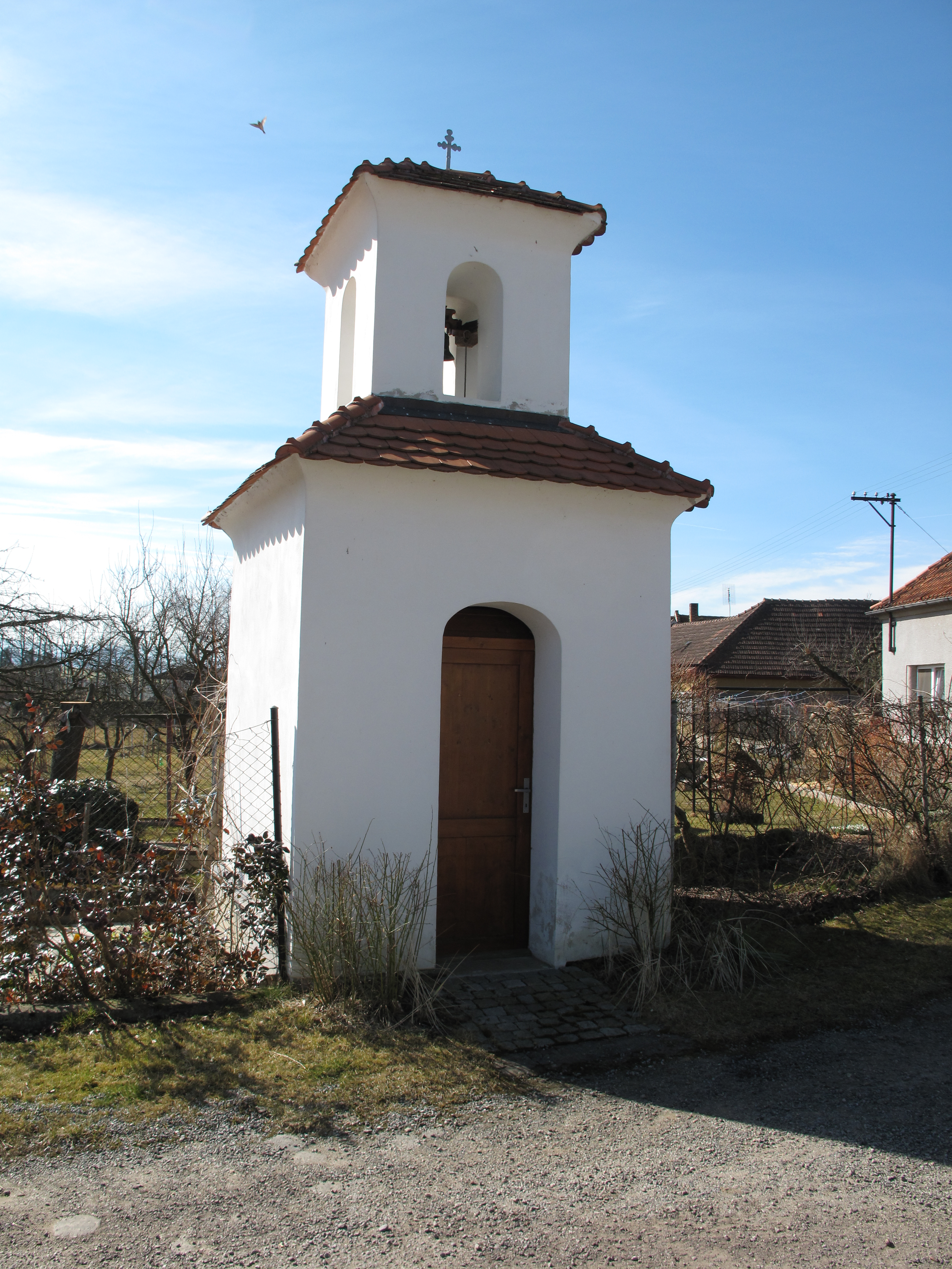 Kaplička v Malém Boru. Okres Prachatice, Česká republika.